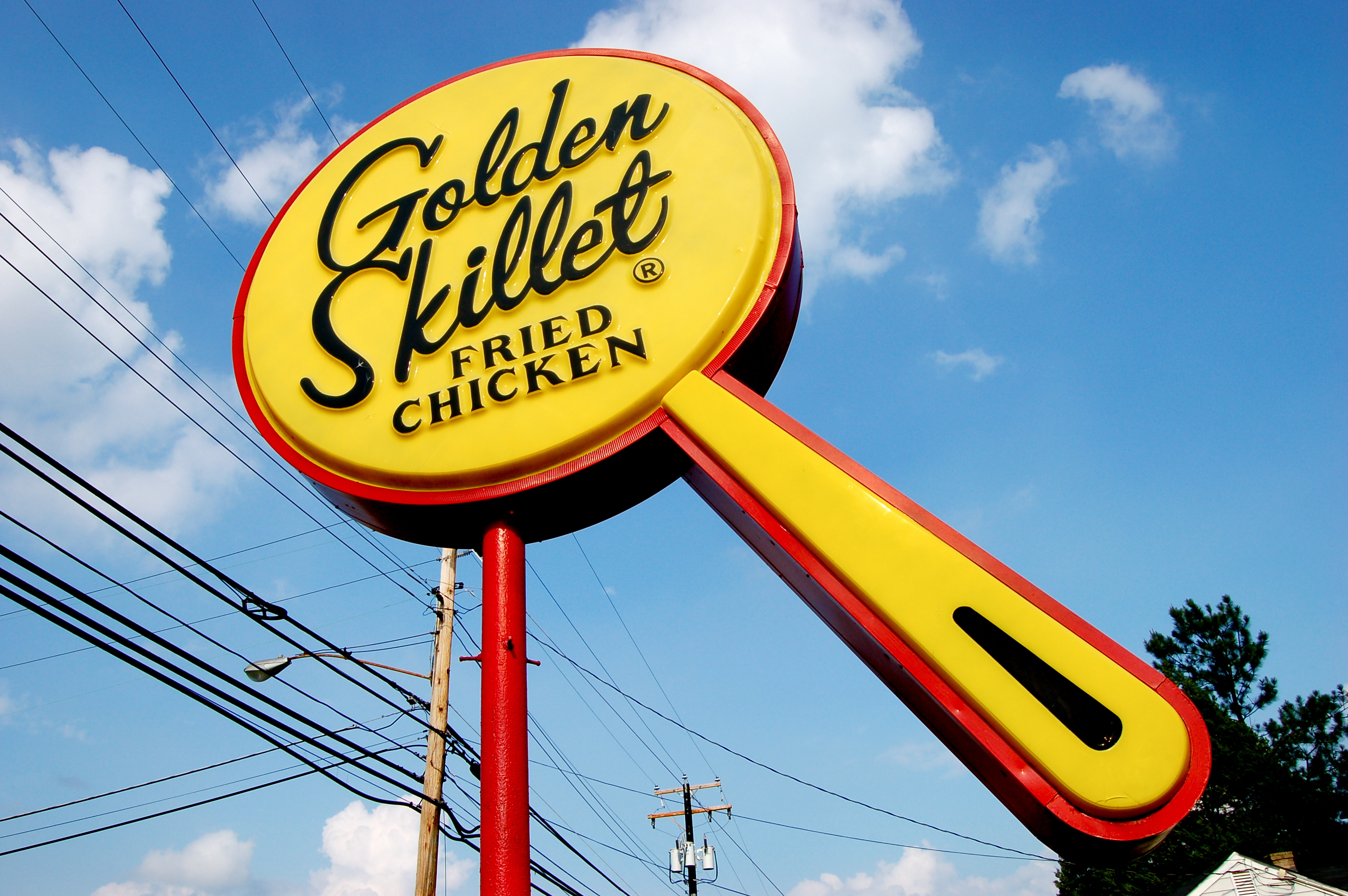 Golden Skillet sign in Sandston, Virginia